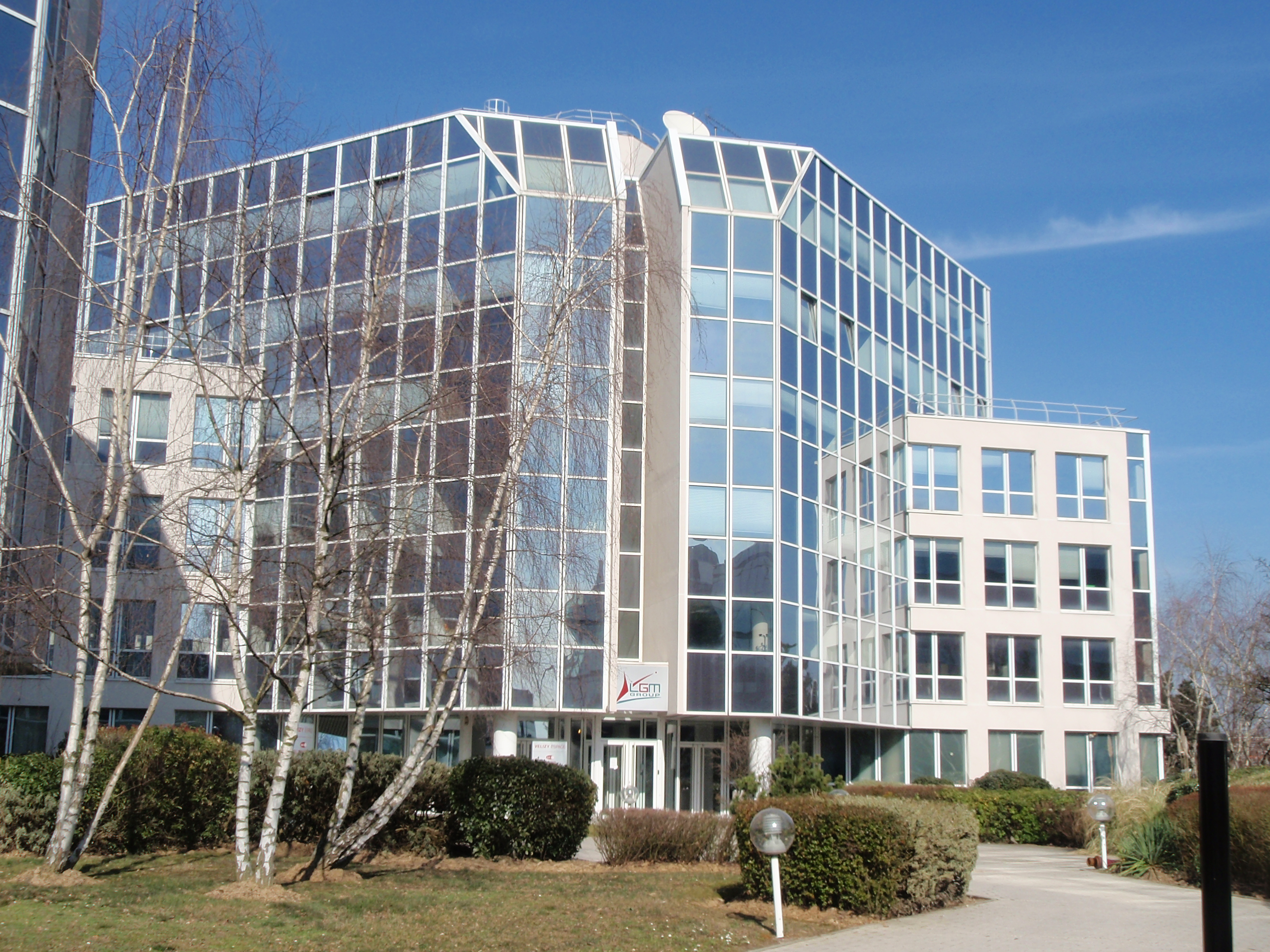 Photo des locaux du Groupe LGM à Vélizy-Villacoublay